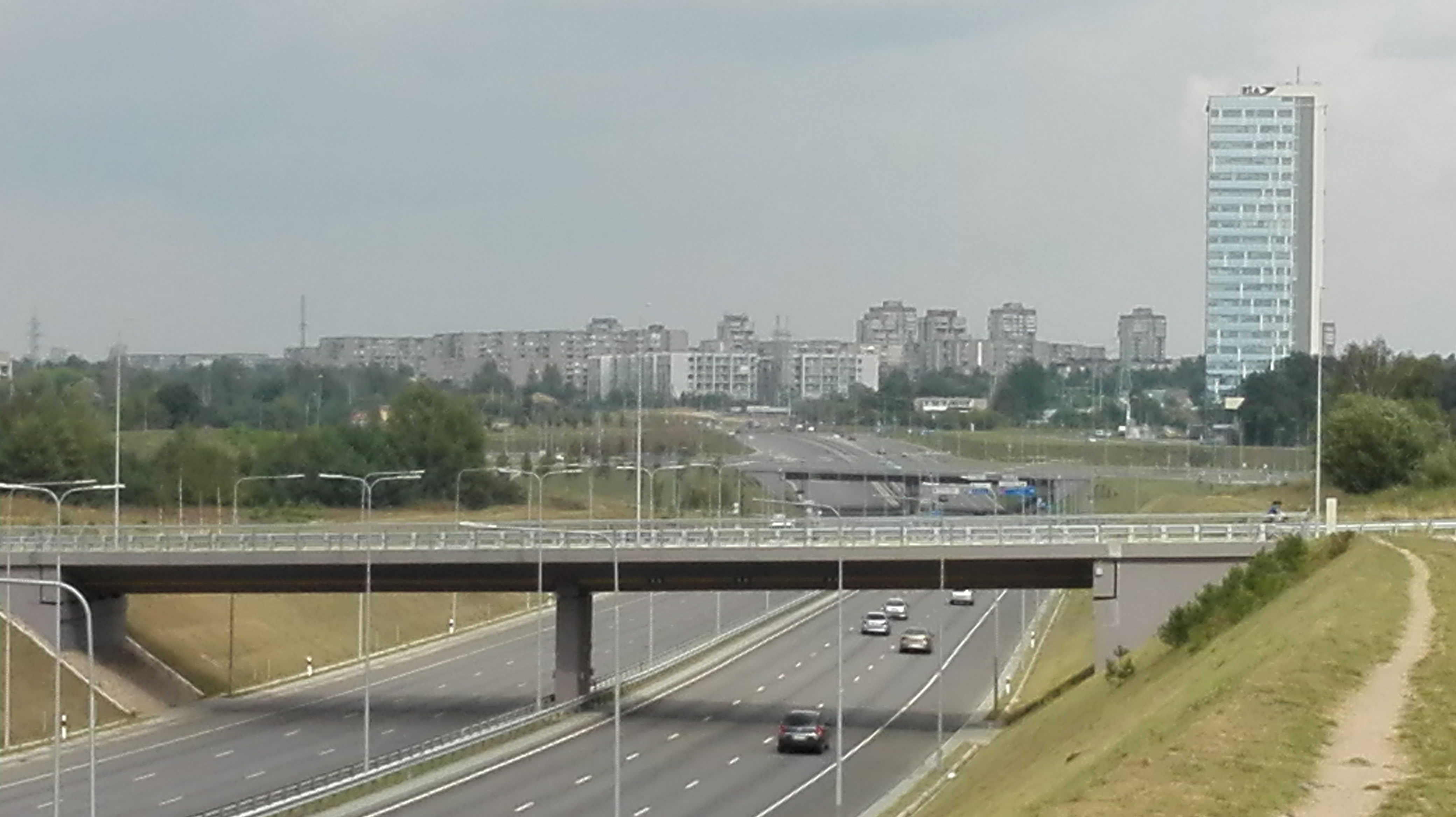 Vilniaus Vakarinis Aplinkkelis 2015 m.